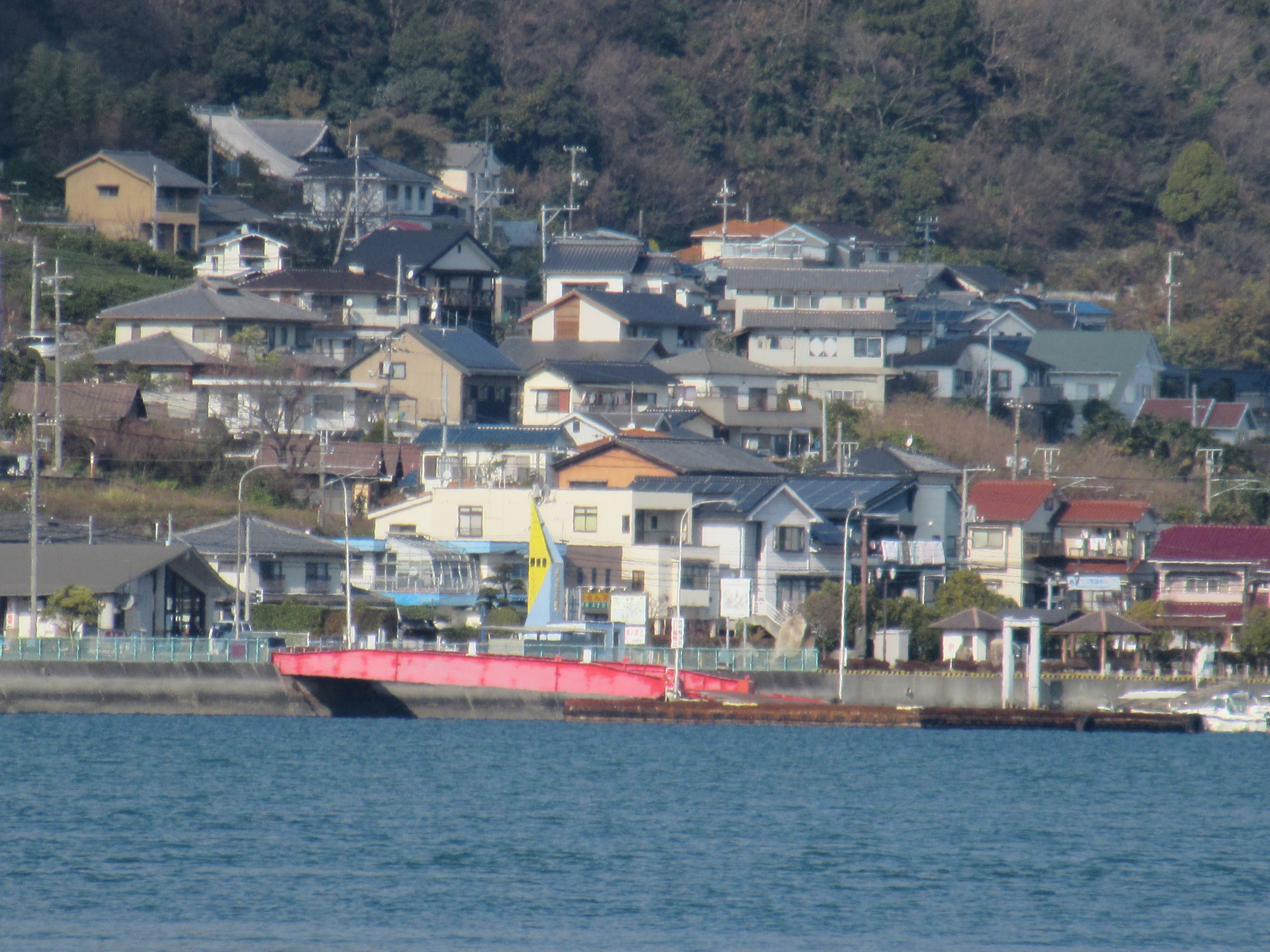 三原市・須波港